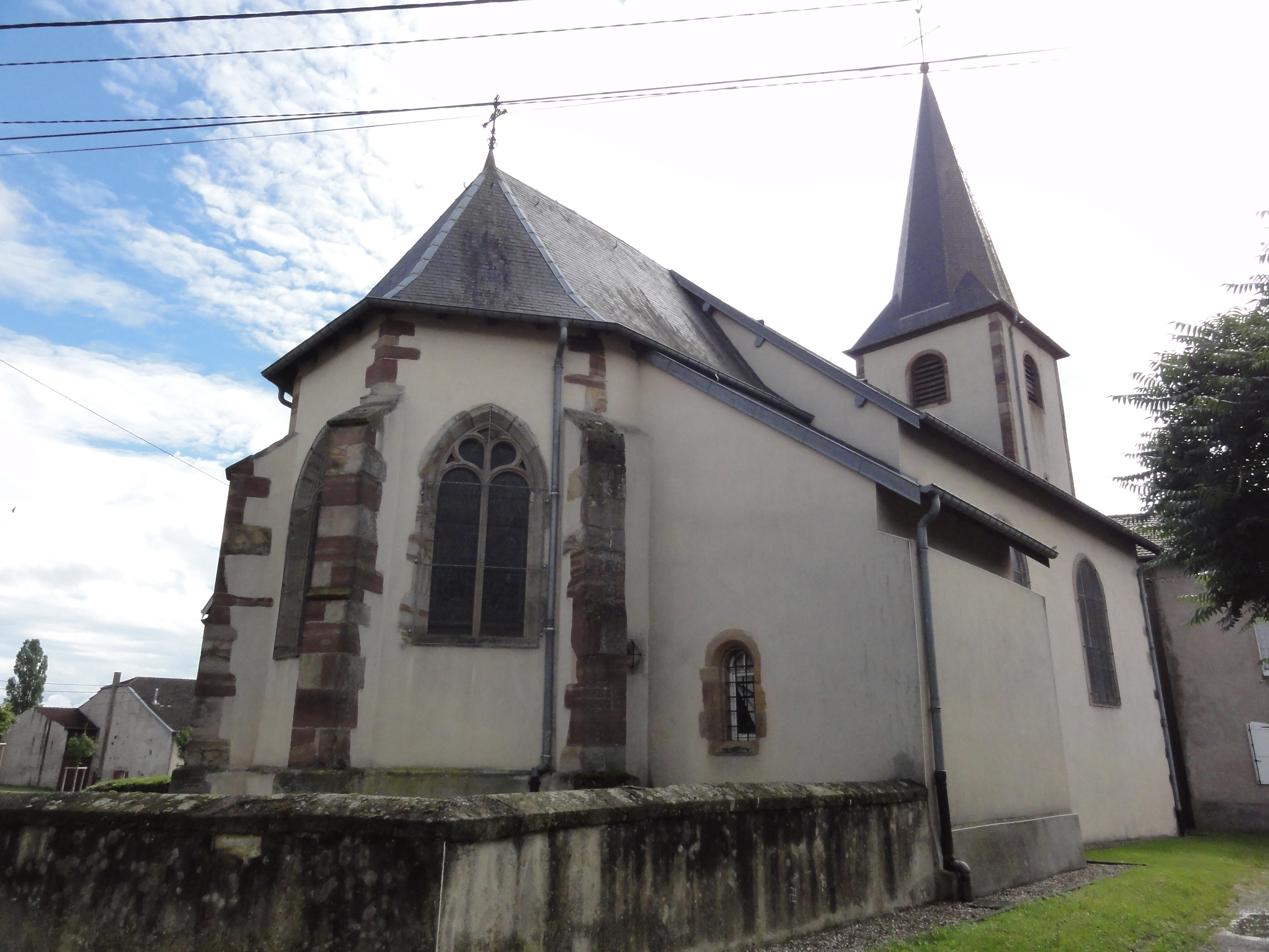 Gélacourt (M-et-M) église